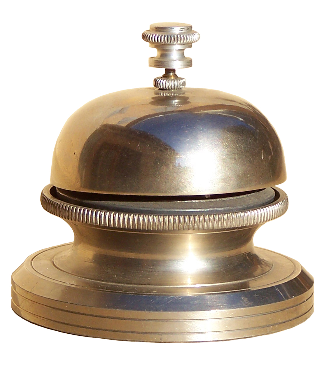 Sonnette de type hôtel ou de table. Elle s'actionne en faisant tourner la petite partie supérieure.